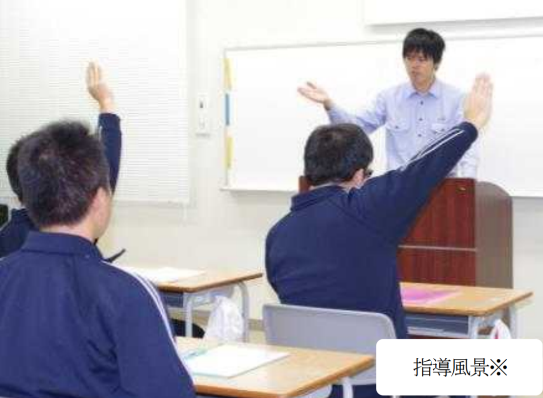 指導風景（法務教官）